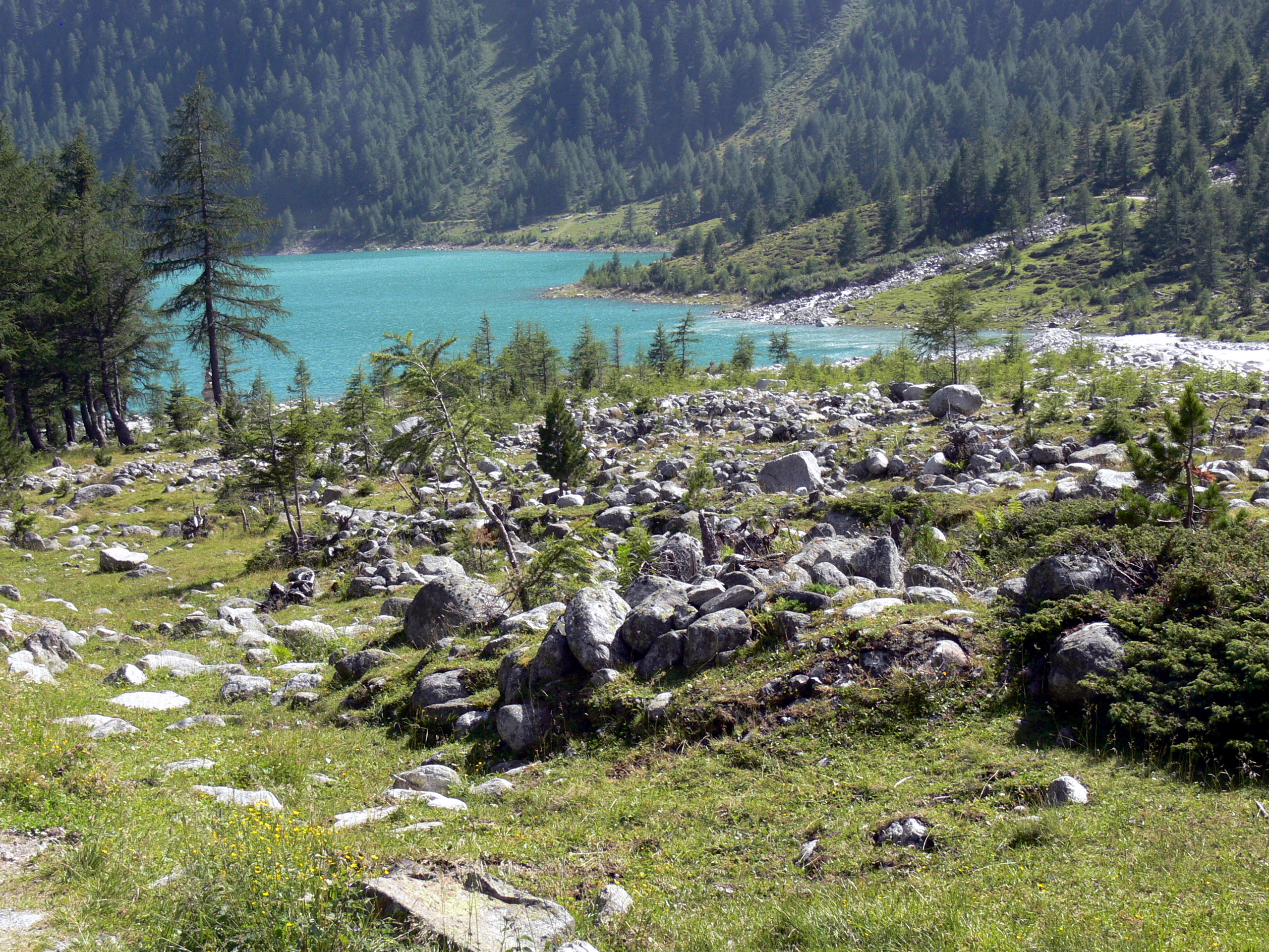 Mühlwalder Tal. Geröllfeld am Nevesstausee.